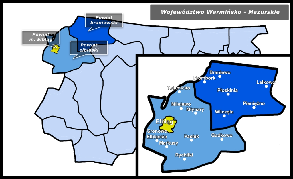 mapka powiatów administrowanych przez WKU w Elblągu